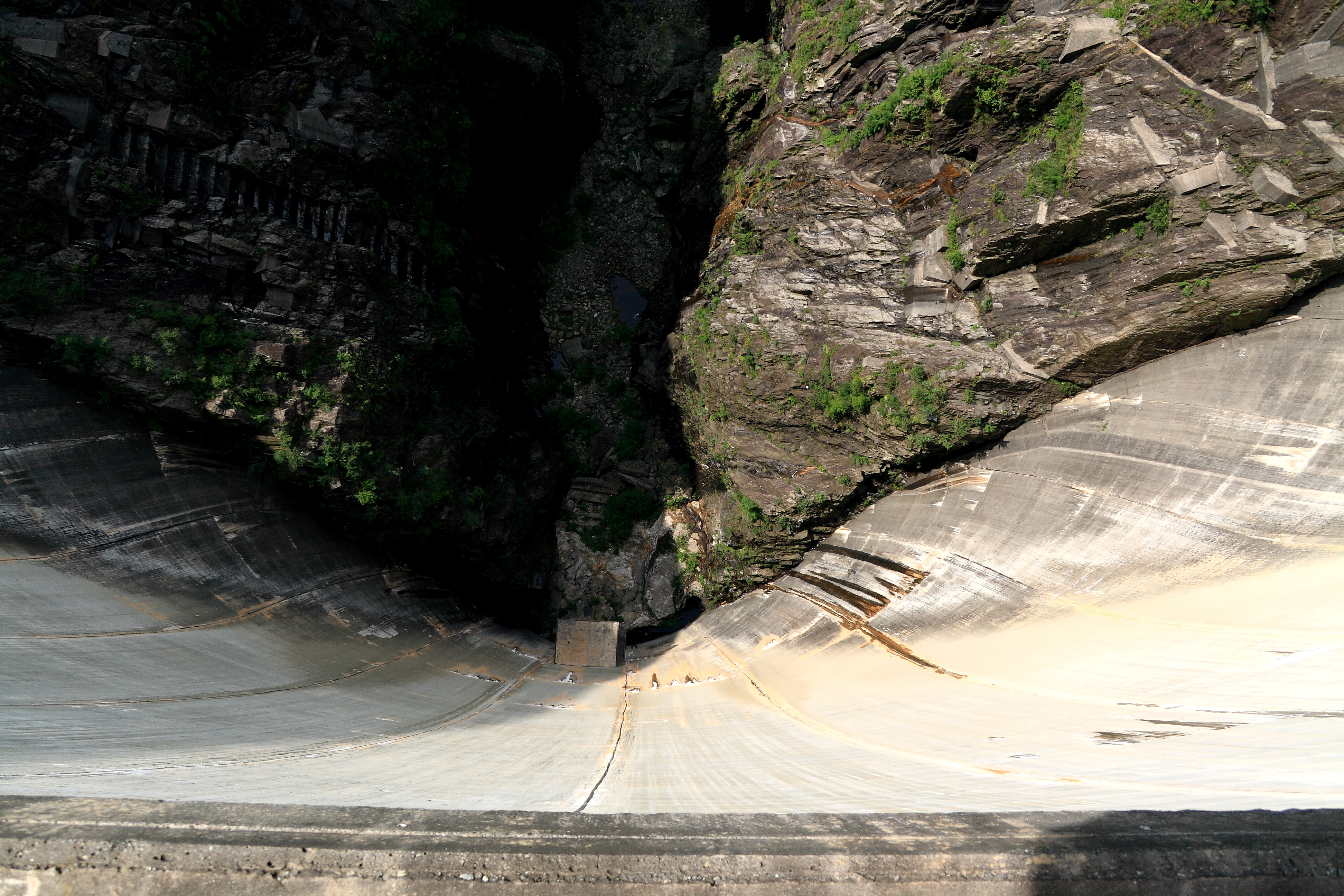 Staudamm Selvatica im Verzascatal